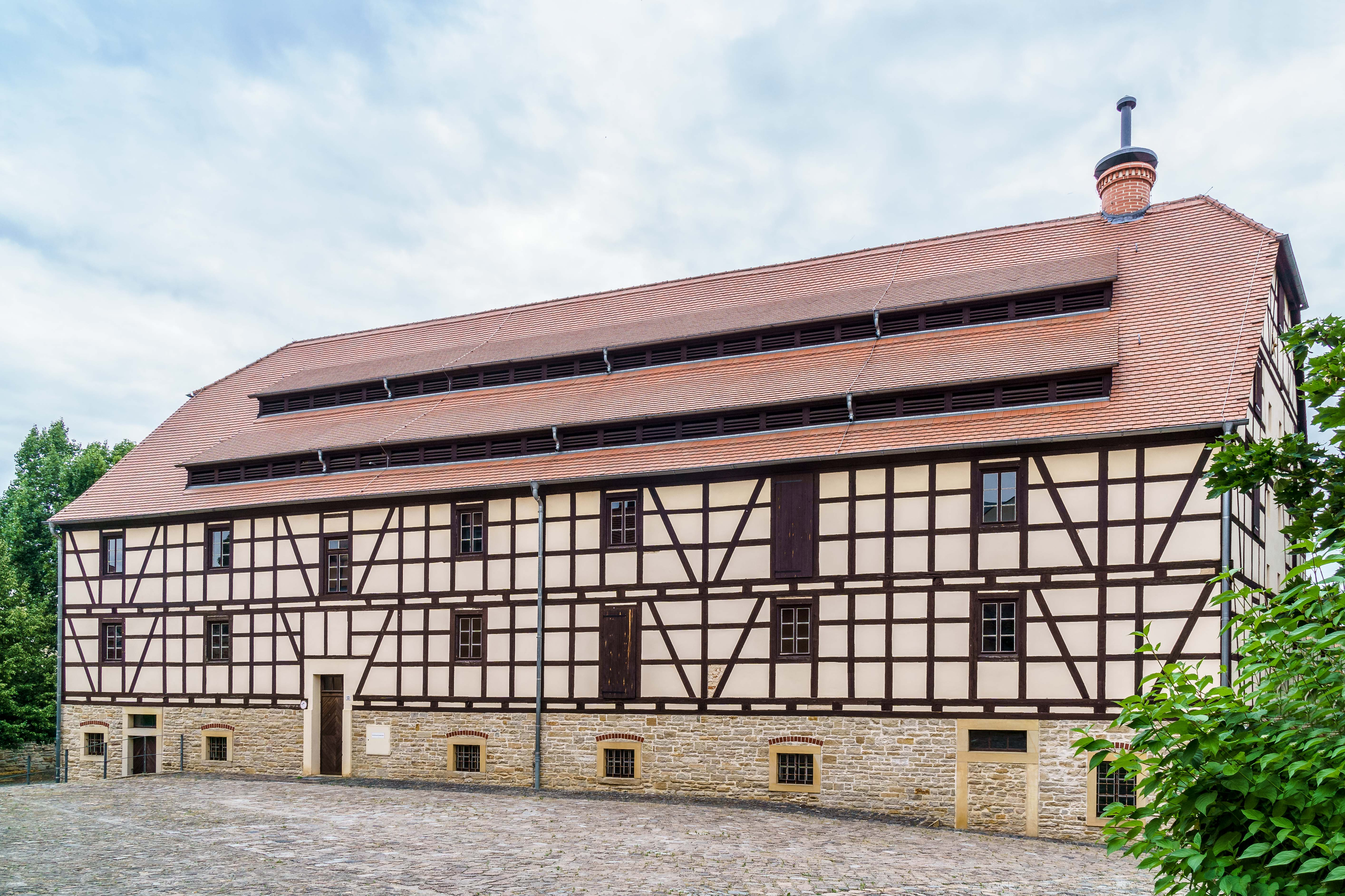 Alte Mälzerei (Oberes Brauhaus), Kalkstraße 32 in Zeitz